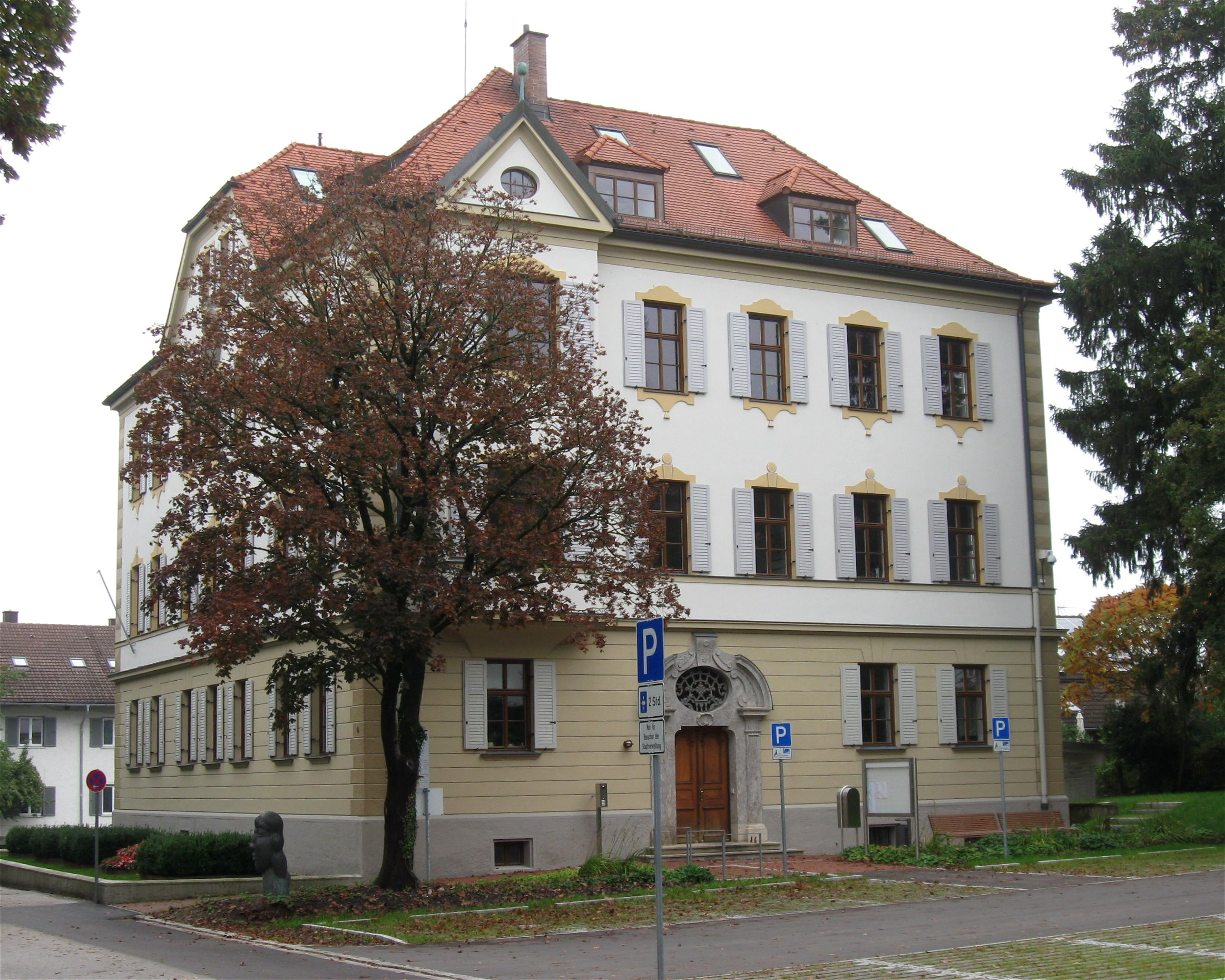 Am Klafferer 4, Bad Aibling; ehem. Bezirksamt, jetzt Landratsamt Rosenheim, dreigeschossiger Massivbau mit Walmdach, Erker, traufseitigem Giebel und Putzgliederung, im neubarocken Stil, 1900.